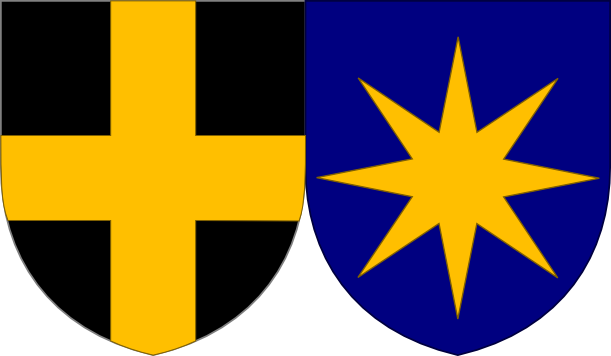 Znak 3. biskupa litomyšlského